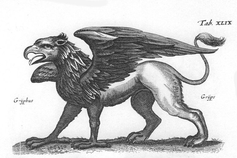 Griffioen.